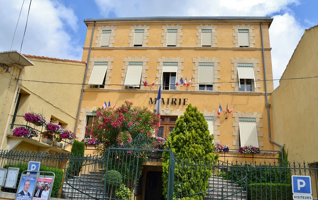 la Mairie